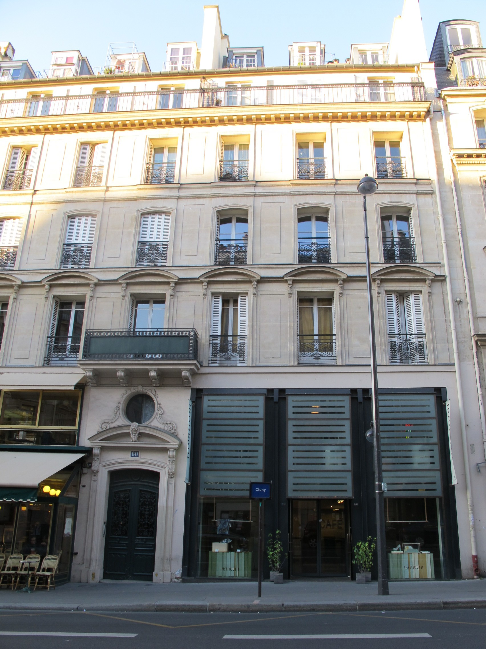 60 Rue des Écoles, Paris, siège de l'Institut finlandais de Paris